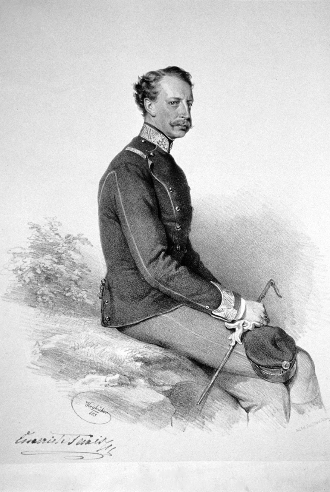 Emmerich Prinz von Thurn und Taxis (1820-1900), General der Kavallerie, Vliesritter, Oberstallmeister, Gardekapitän der k. k. Leibgarde - Reiterescadron. Leopoldsorden